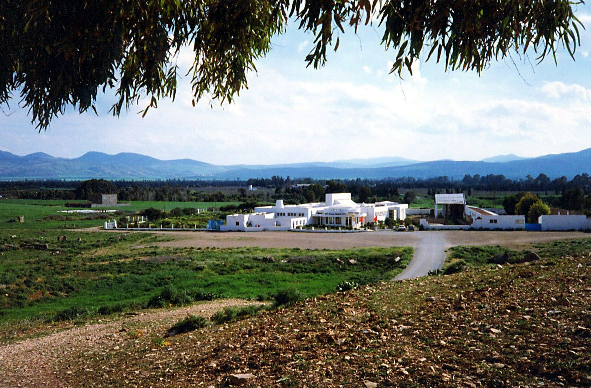 Museum in Chemtou Tunesien